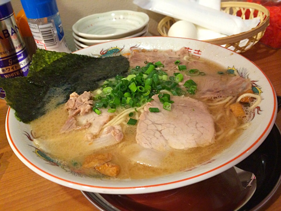 豚骨発祥久留米ラーメン くるめや